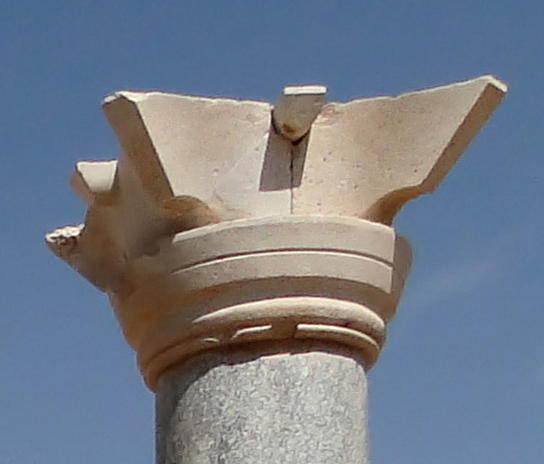 Capitello "nabateo" reimpiegato nella Blue Chapel di Petra, in Giordania La "Blue Chapel" è quella della residenza del vescovo di Petra, situata sul lato nord della via colonnata, e fu sistemata nel V-VI secolo, riutilizzando fusti di colonna in granito bluastro dall'Asia Minore con capitelli nabatei e basi provenienti da un precedente edificio. Il complesso episcopale riutilizava un edificio precedente forse di uso militare. Le colonne crollarono nel terremoto del 748-749 e la cappella è stata scavata nel 2000-2001 dall'American Centre of Oriental Research, sotto la direzione di Patricia M. Bikai. (notizie su questa pagina del sito . )